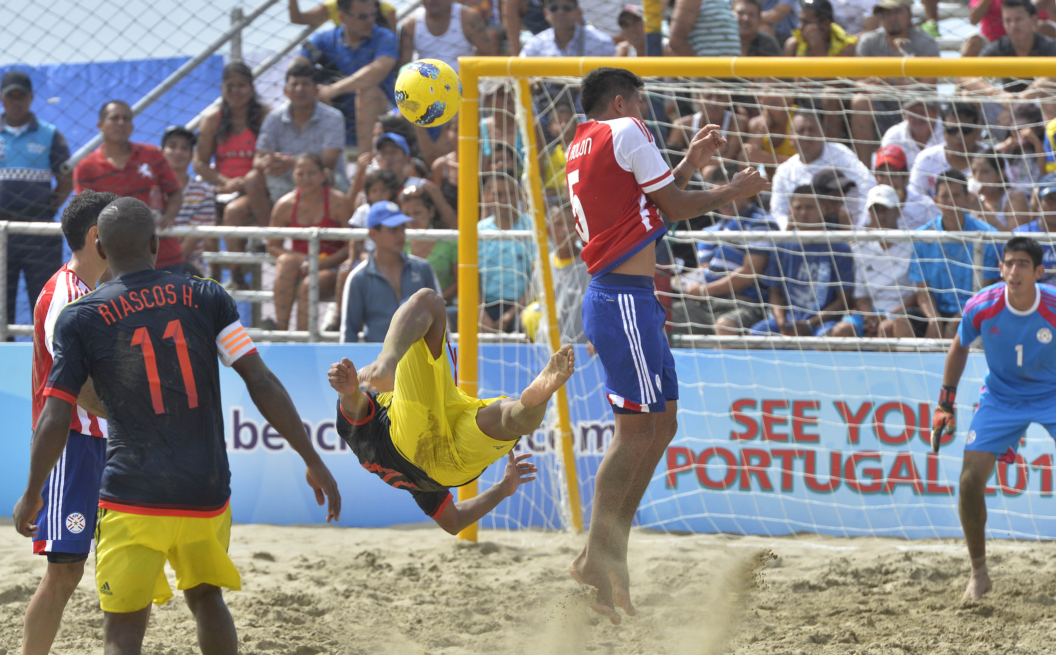 Manta, domingo 19 de abril del 2015 (ANDES).-En Manta se desarrolla el Campeonato Sudamericano de Fútbol de Playa. En la gráfica el partido entre Colombia y Paraguay Foto:César Muñoz/ANDES